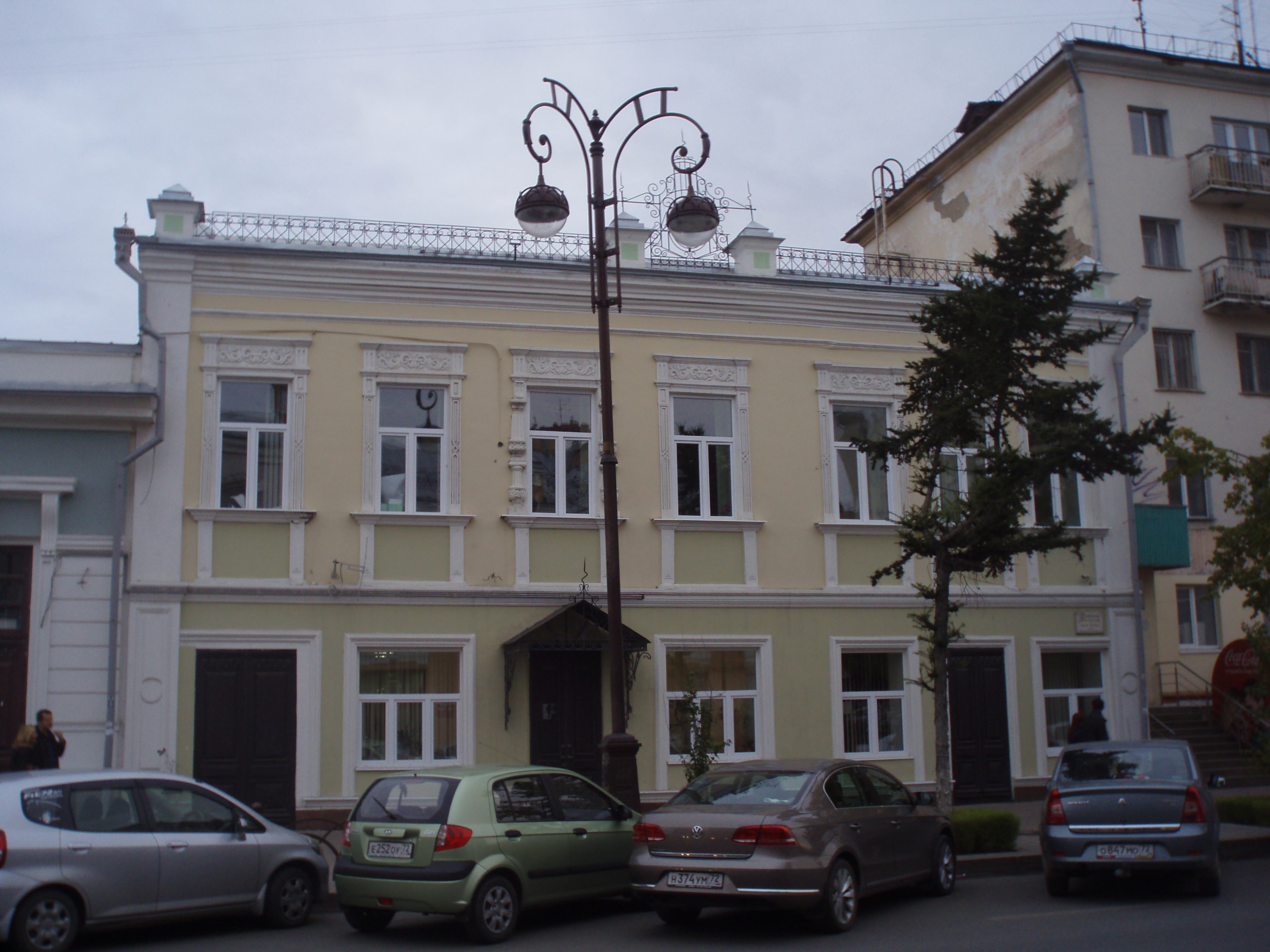 Дом жилой (Тюменская область, Тюмень, Республики улица, 30)